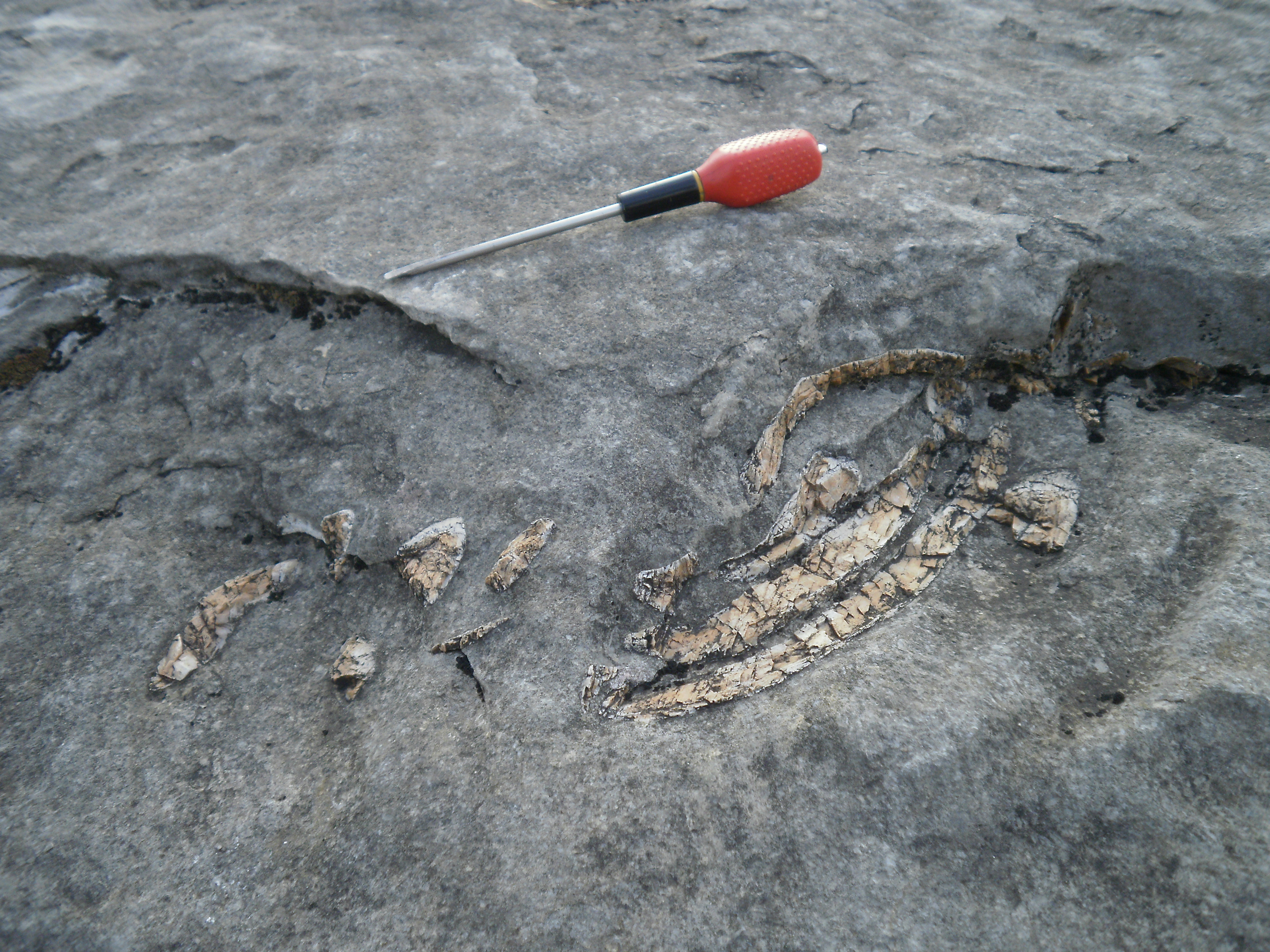 Amer. Coordenades UTM 31N , dàtum ETRS89: E(X) 467.767 / N(Y) 4.652.171 / H (Z) 450 metres.. This is a a photo of a paleontological site in Catalonia, Spain, with id: IPAPC-21930